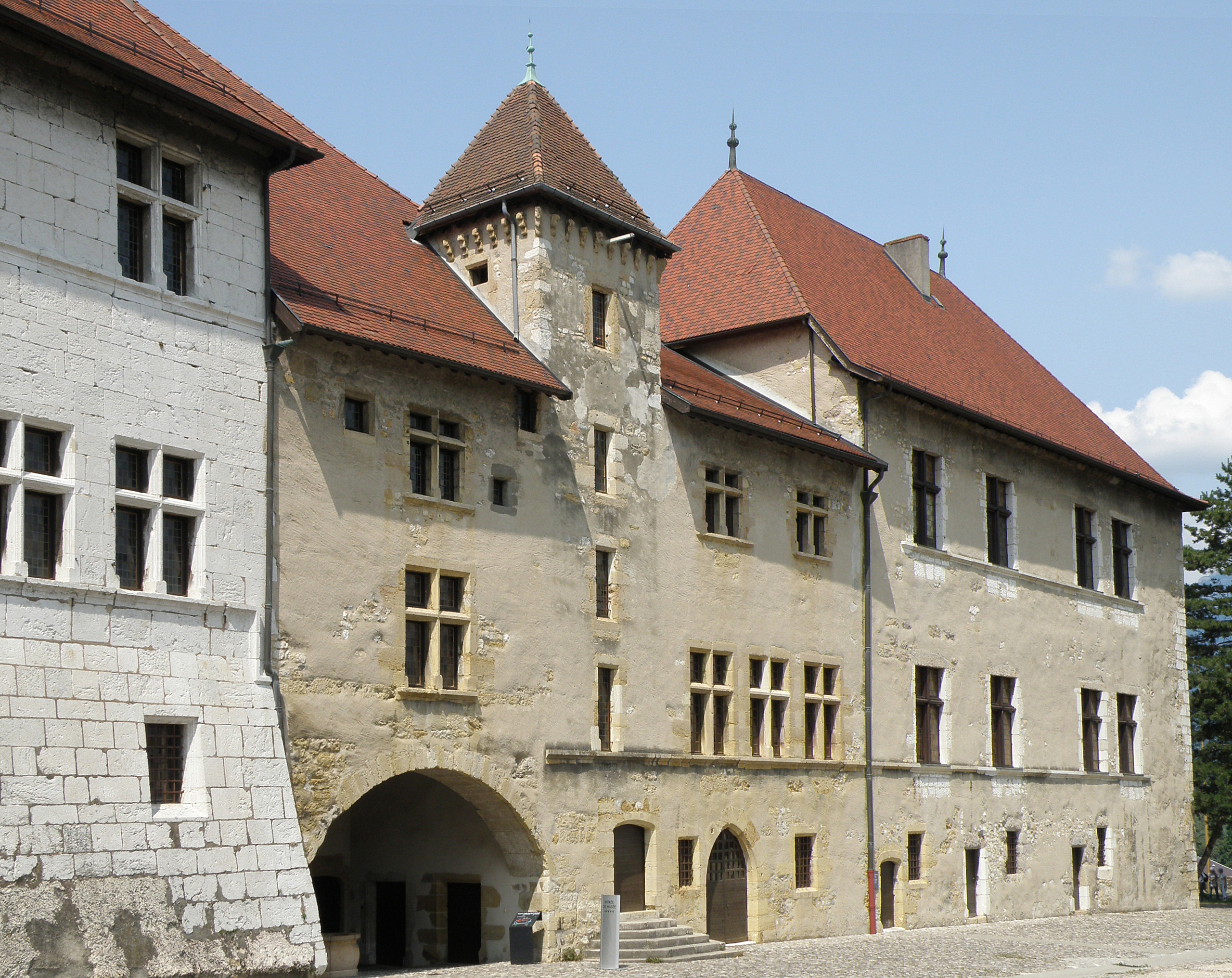 Annecy, ville et préfecture du département de la Haute-Savoie (région Rhône-Alpes, France). Le château : de gauche à droite, le logis Nemours (pierre blanche), le Vieux Logis (avec tour à escalier), le logis Neuf (à droite).